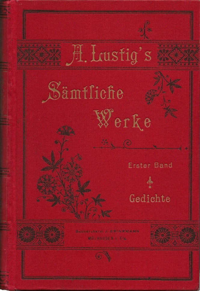 Büech Sämtliche Werke Erster Band. Veräffentligt ànna 1910.